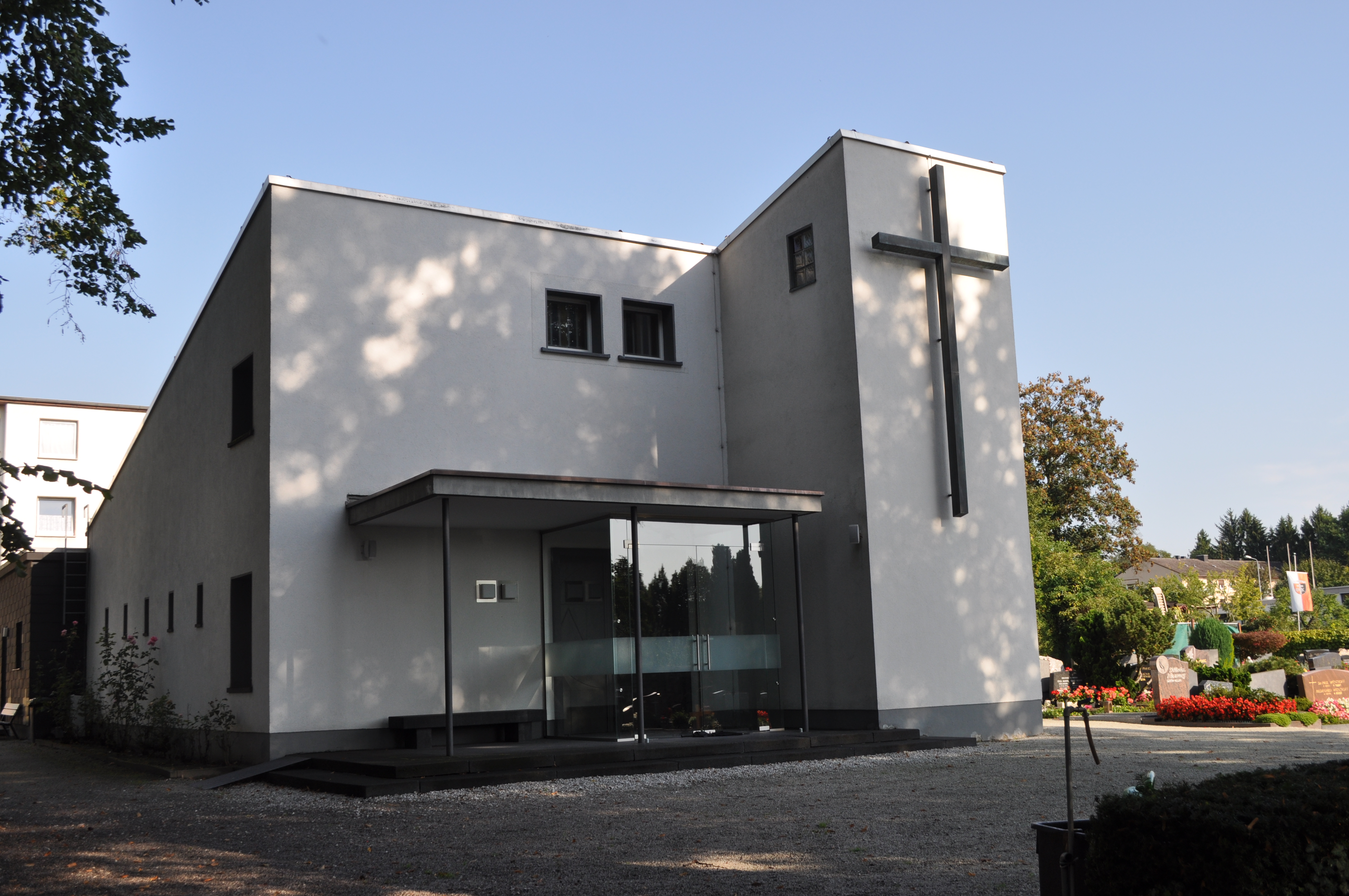 Bad Homburg, Evangelischer Friedhof, Saalburgstraße, neue Trauerhalle